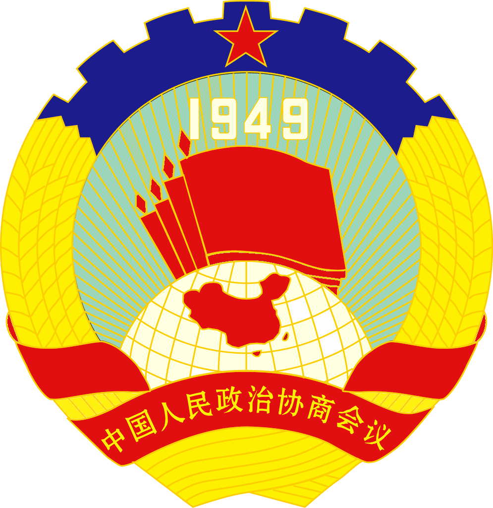 The emblem of Chinese People's Political Consultative Conference, used since 1949.